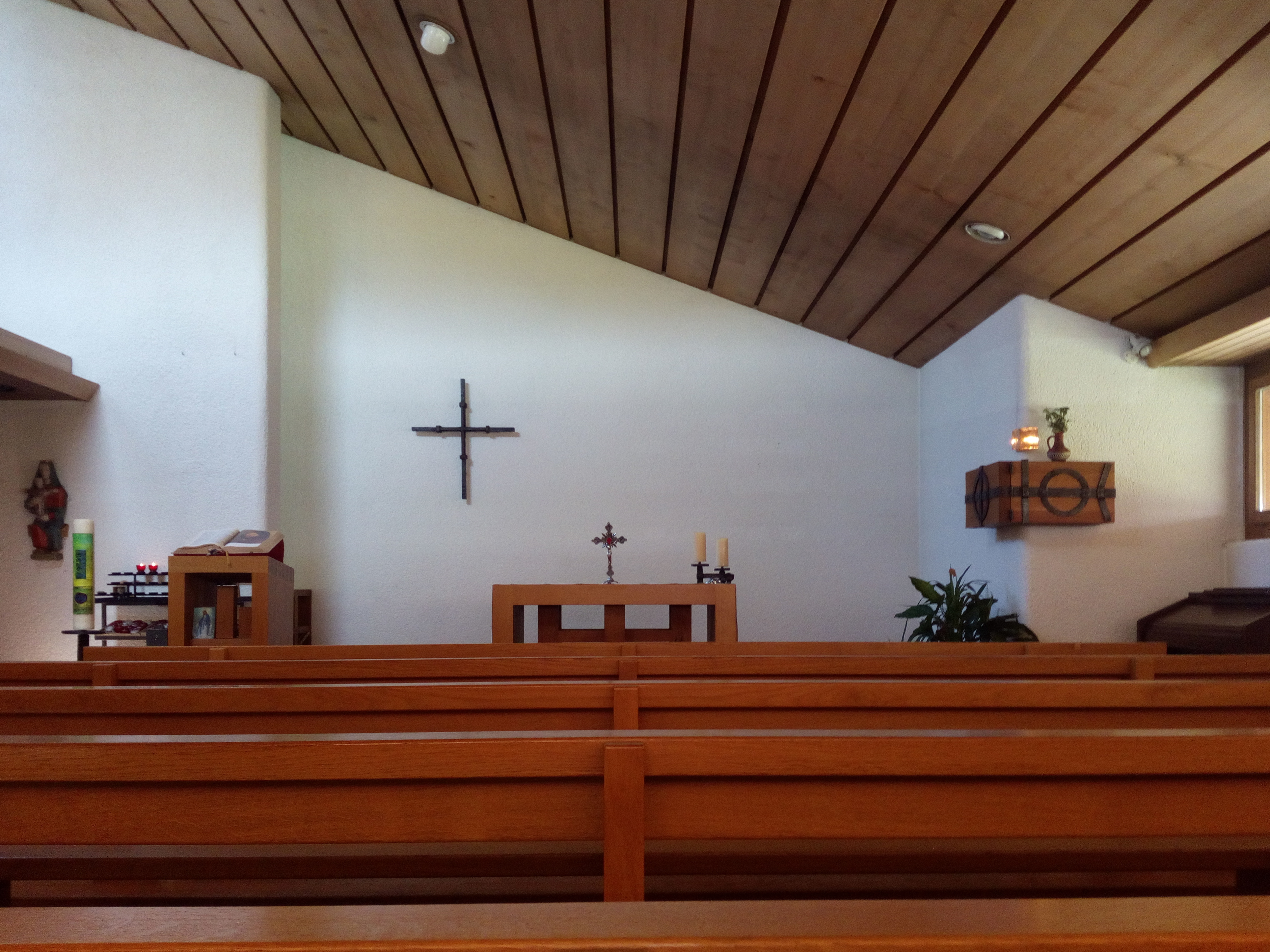 Römisch-katholische Christophoruskapelle Hasliberg, Inneres.